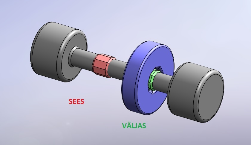 Rotakseeni (rotaxene) graafiline esitus; seda kasutatakse kui molekulaarlülitit. Hantlikujuline molekul koos seibikujulise struktuuriga aatomite kogumiga.